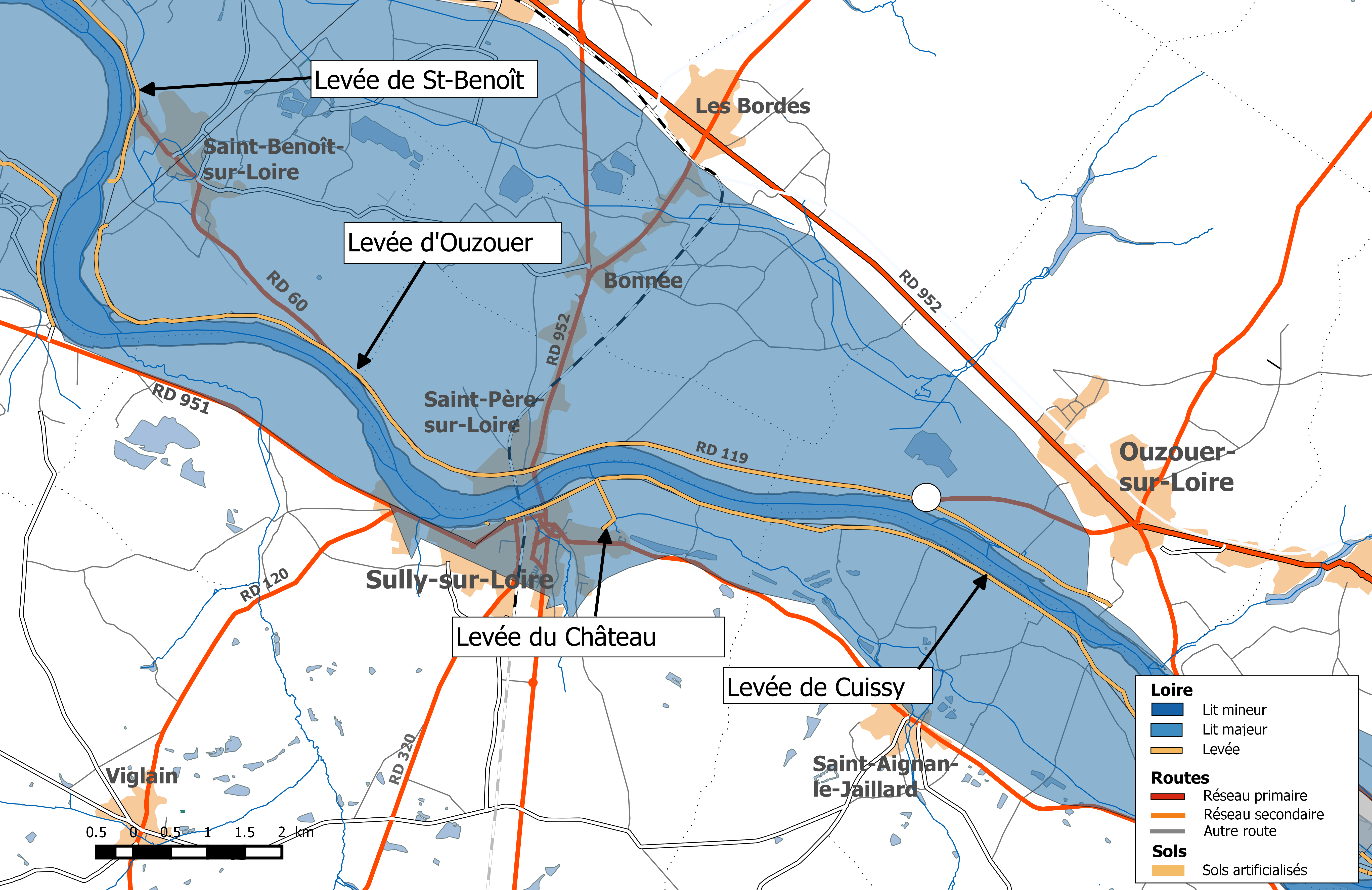 Système d'endiguement de la Loire dans le département du Loiret. Val de Sully.